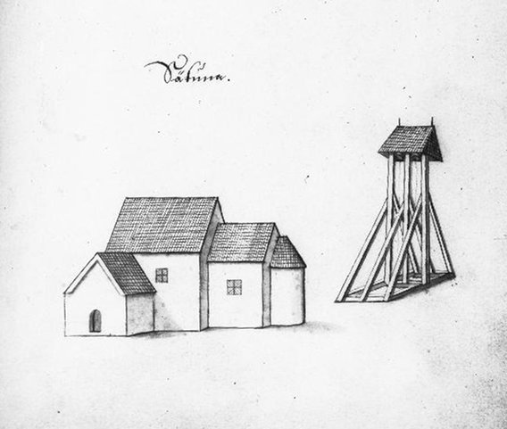 Sätuna kyrkplats, teckning av Johan Peringskiöld ur hans skrift Monumenta (1710-talet).